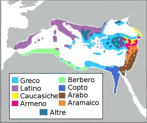 Traduzione